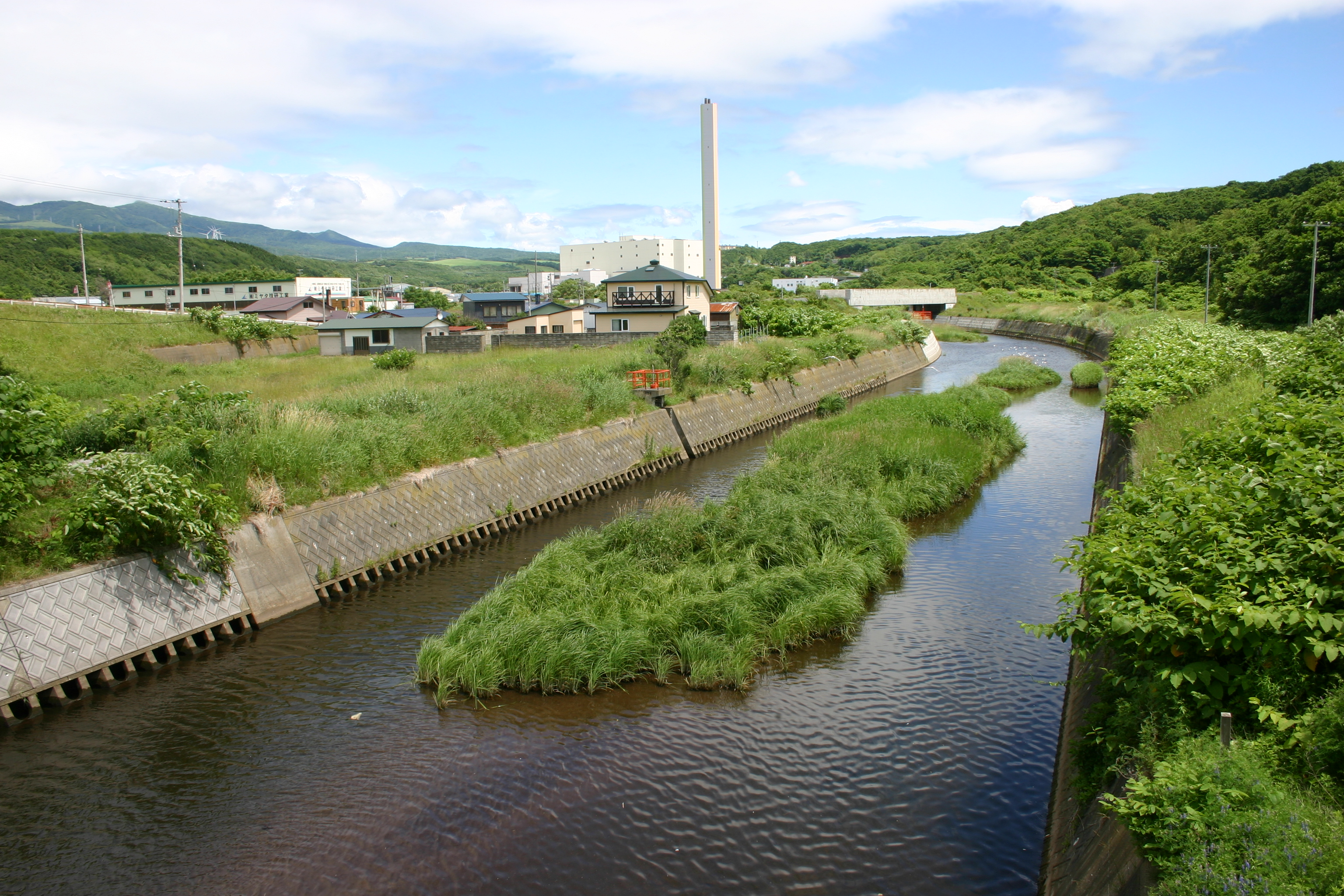 チマイベツ川 千舞別橋より上流を望む